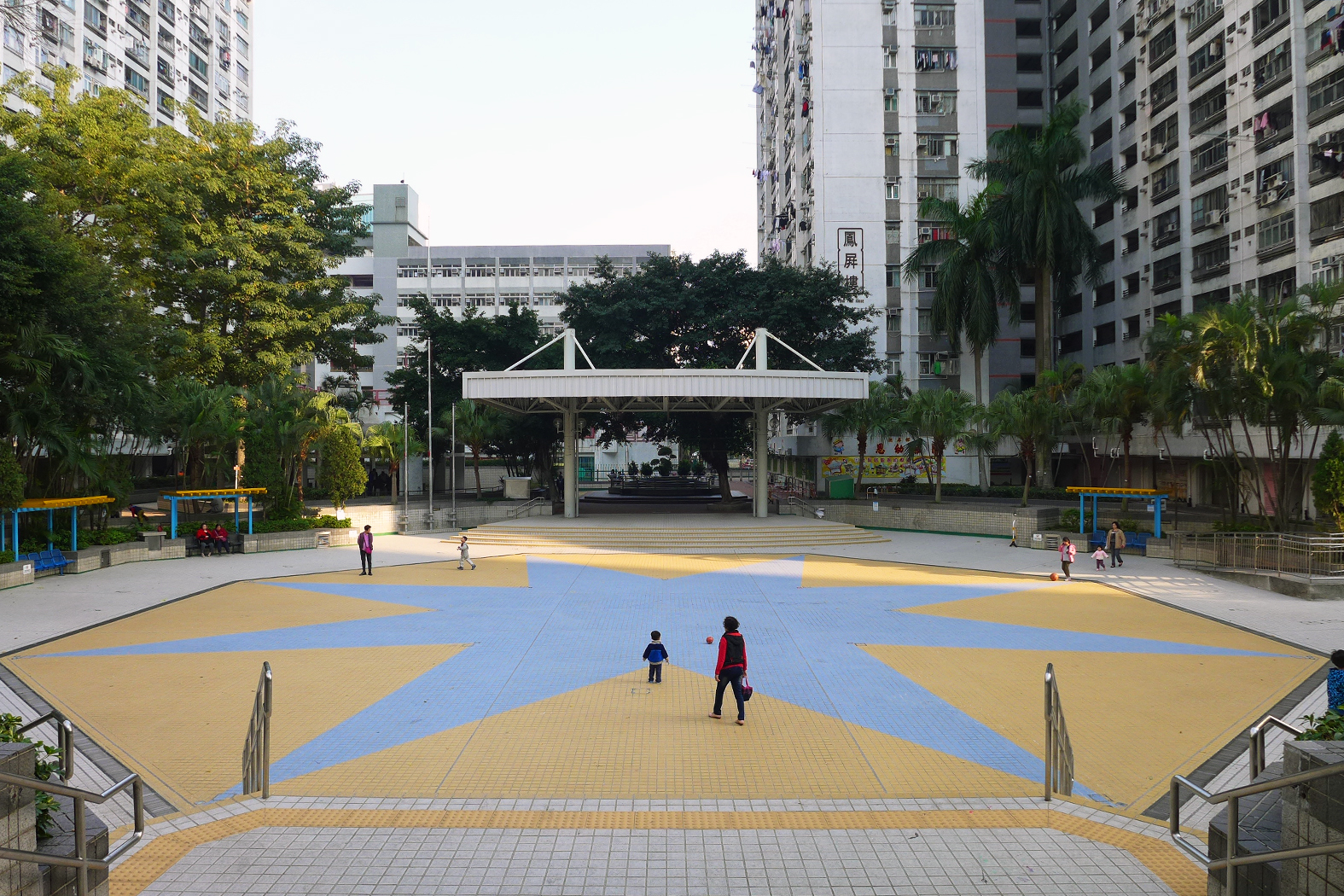 Long Ping Estate